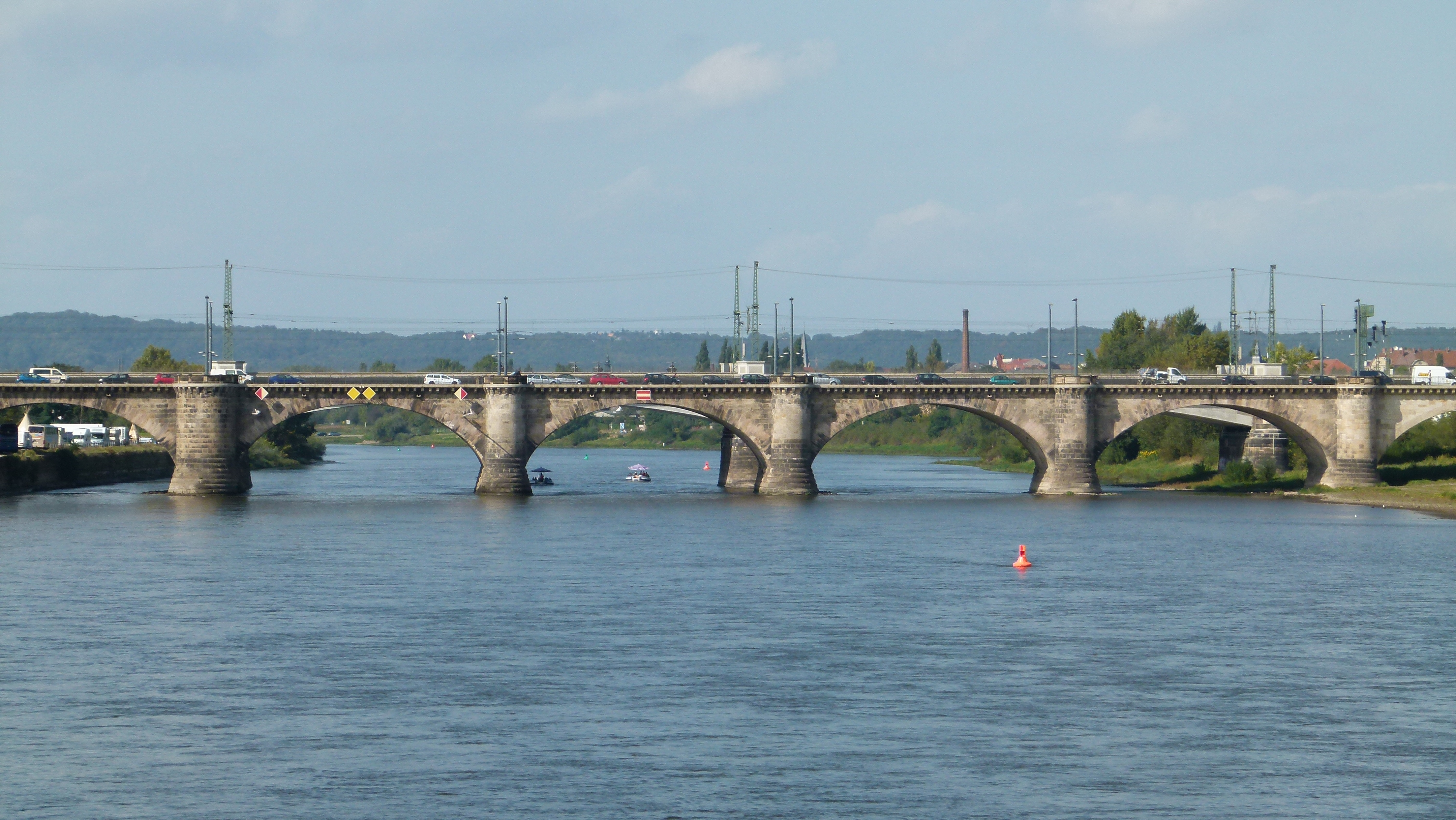 Marienbrücke in Dresden